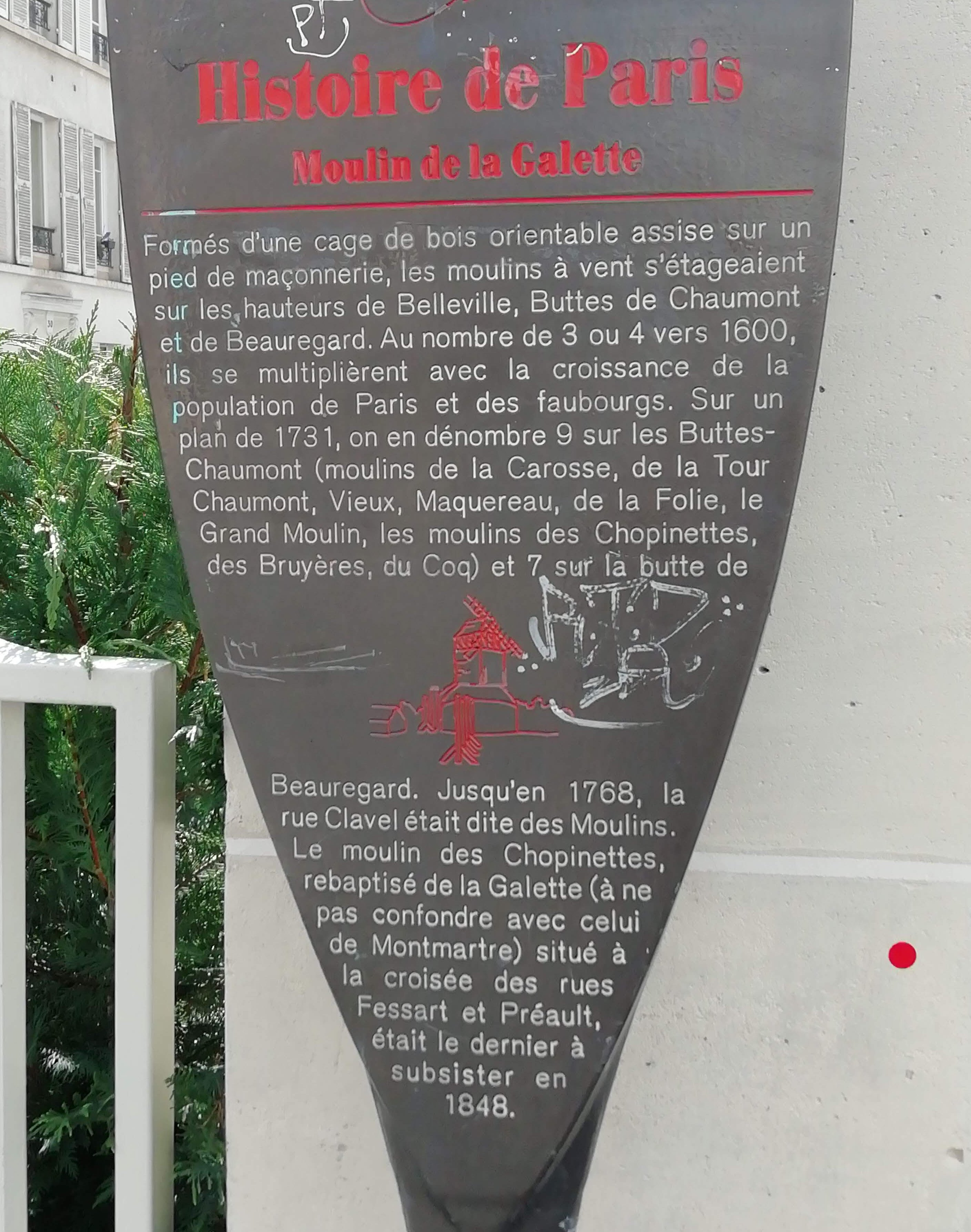 Panneau "Moulin de la Galette" situé au croisement de la rue Fessart et de la rue Clavel